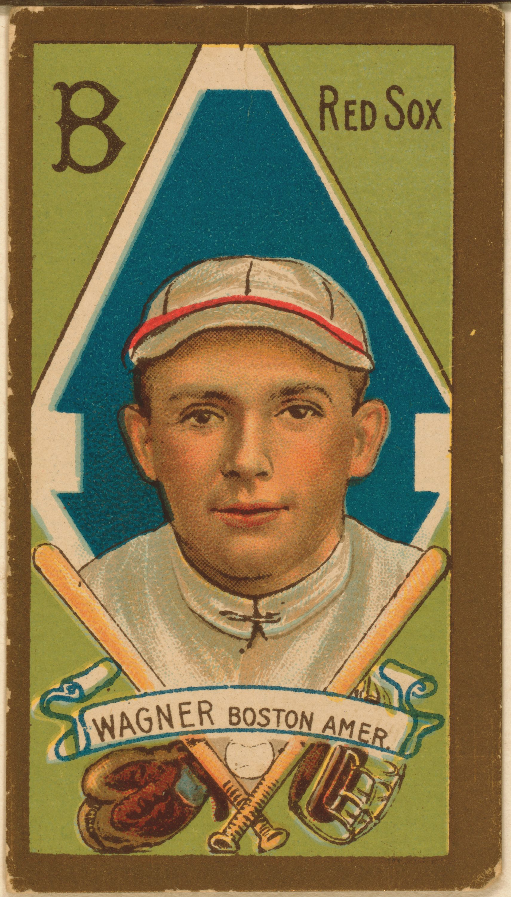 Charles Wagner